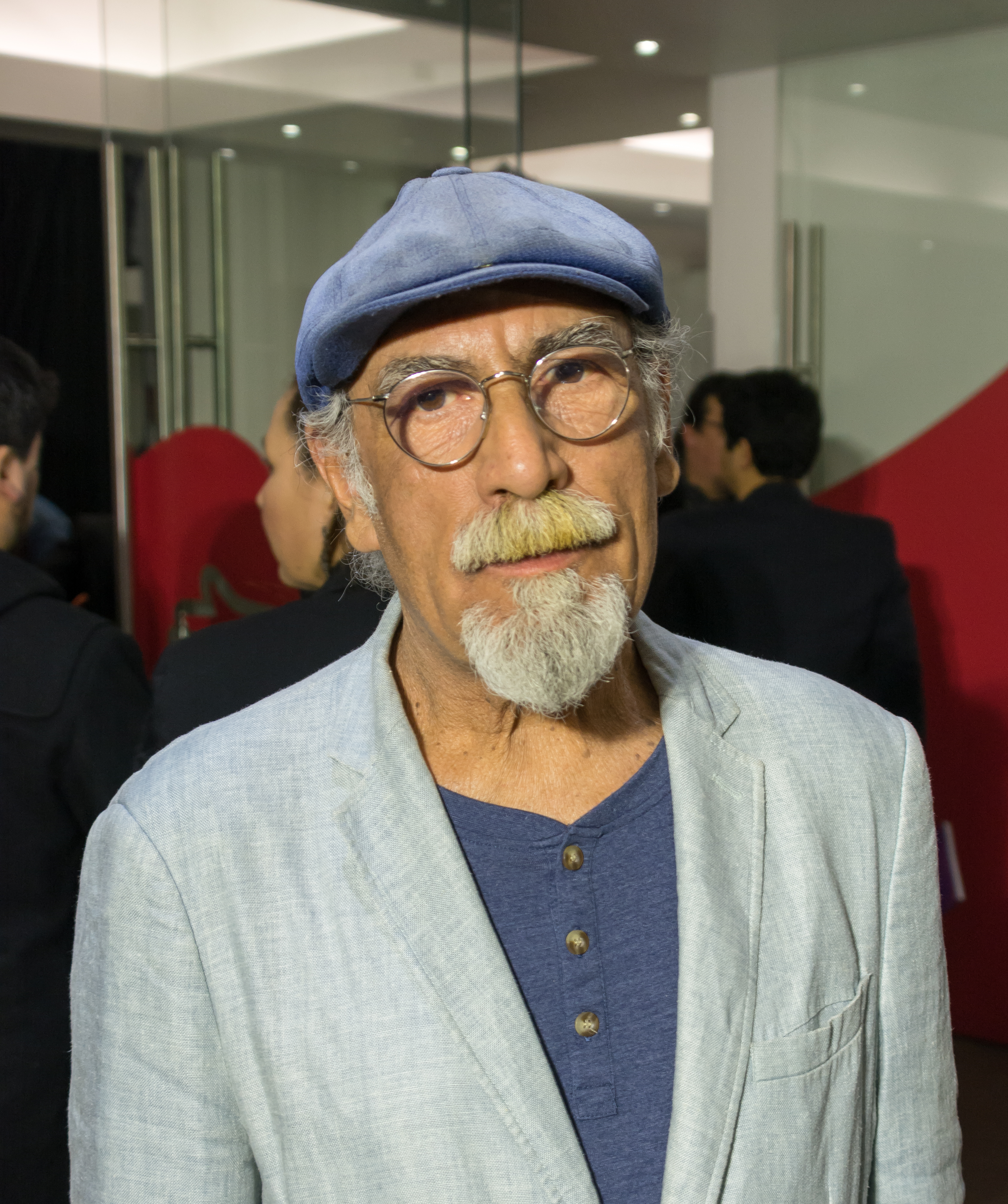 Premios Pulsar 2019, Teatro Teletón, Santiago, Región Metropolitana, Chile.